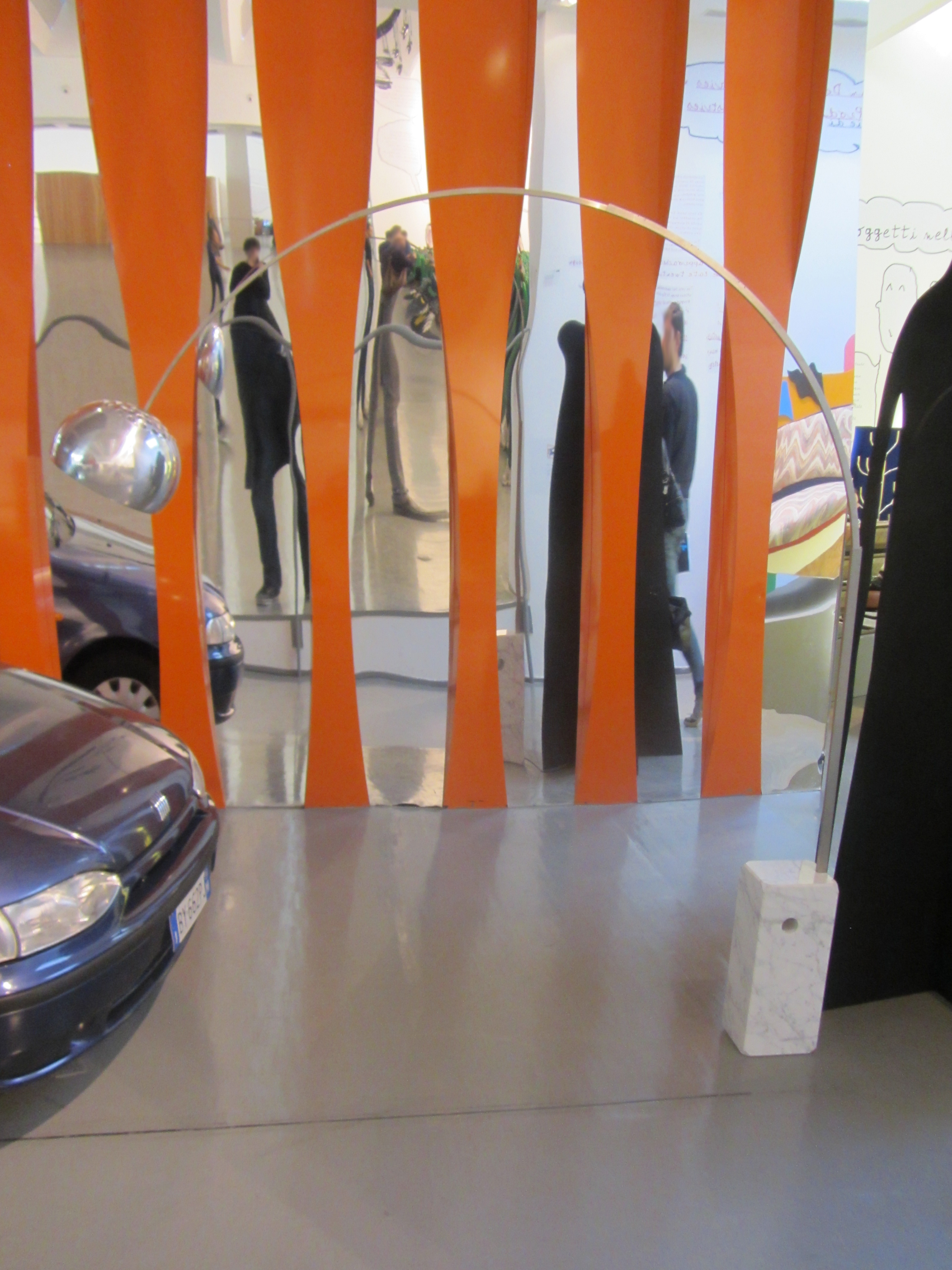 La Lampada "Arco" al Triennale Design Museum di Milano durante la mostra "le fabbriche dei sogni". Giornata dedicata al libero utilizzo e interazione con gli oggetti esposti e liberà di foto.